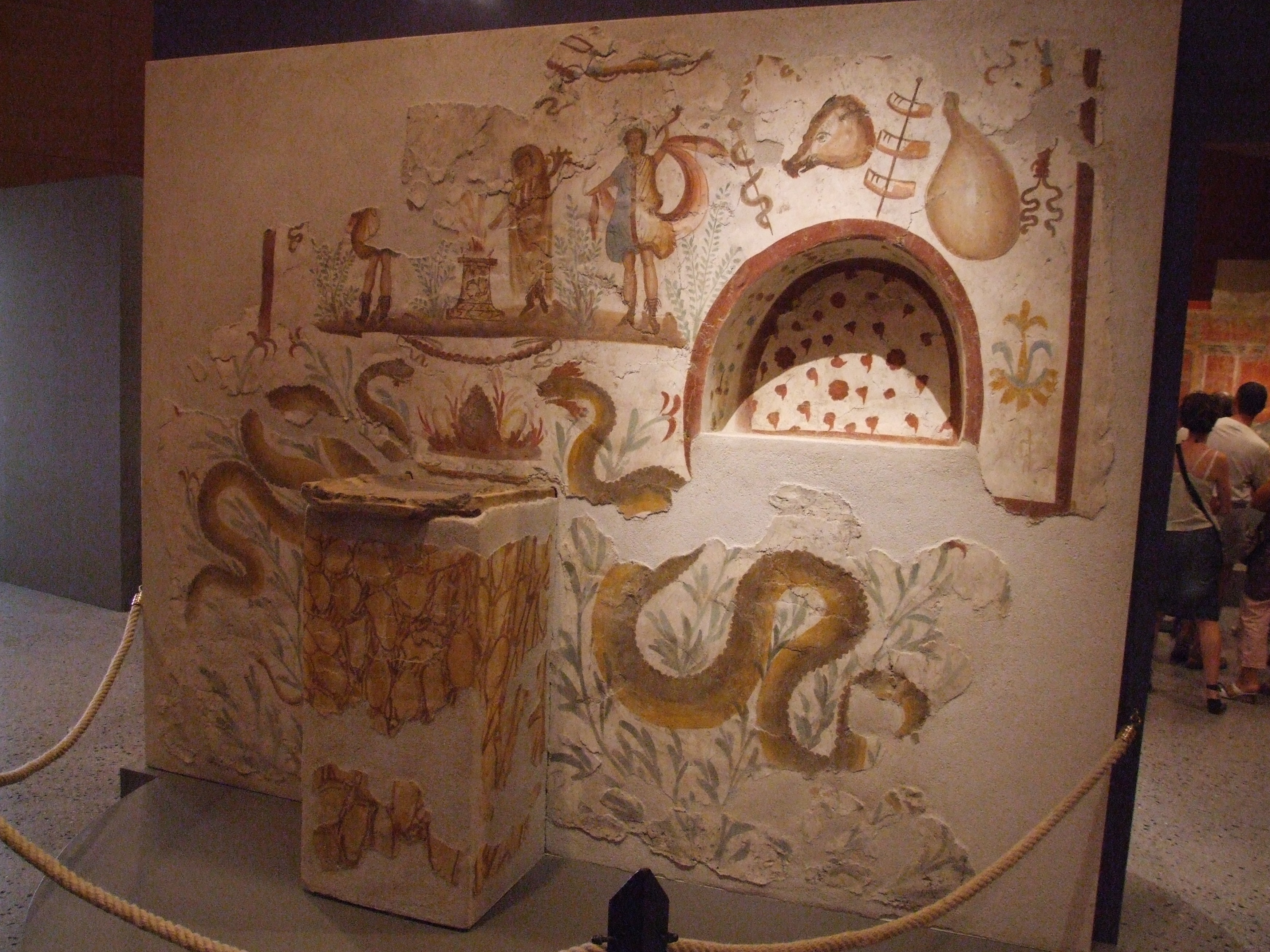 Lararium, Pompeji, 79 n.Chr.; Opferaltar und Nische für Götterfigürchen